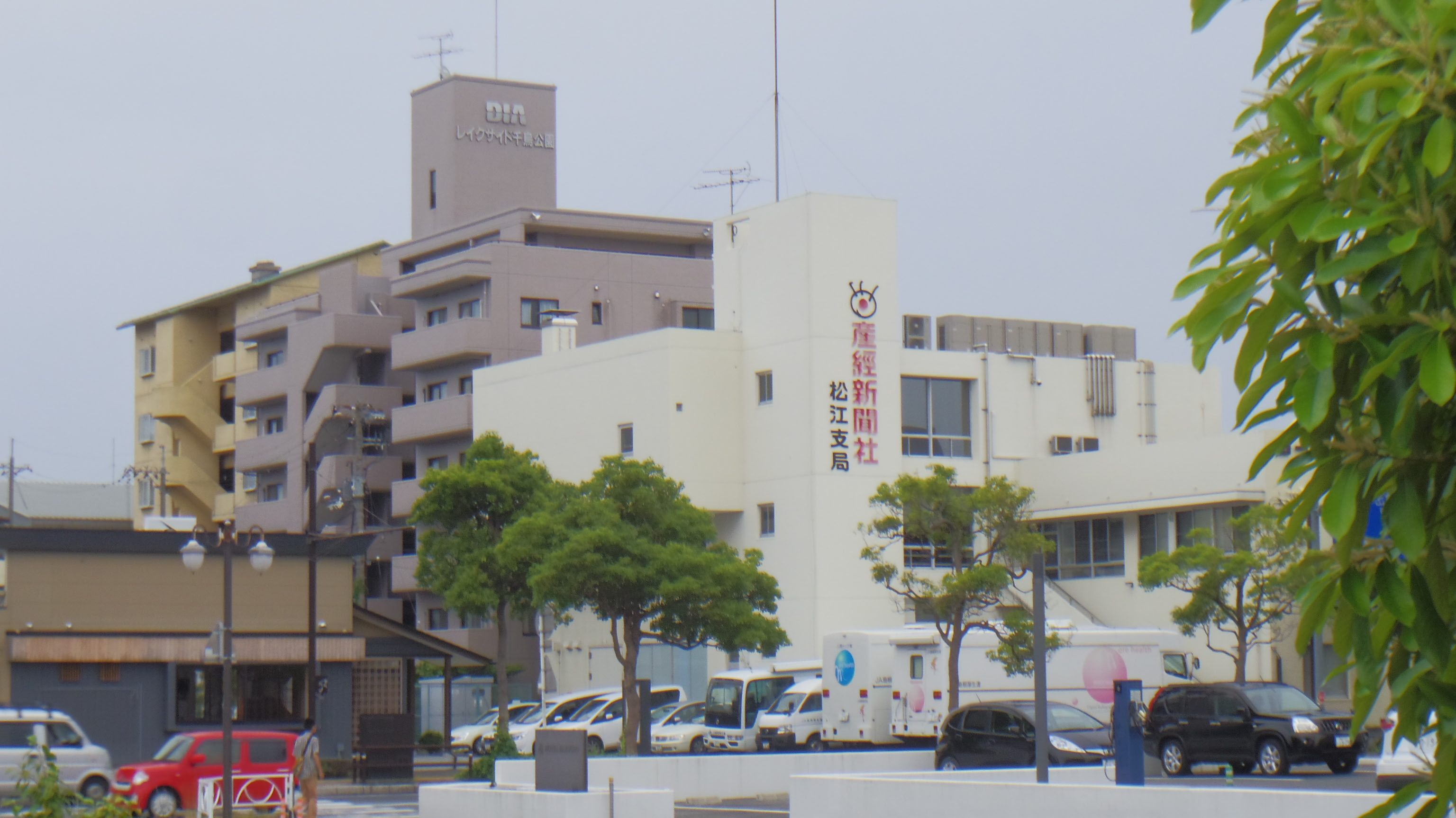 産経新聞社松江支局（島根県松江市）。一畑電車北松江線・松江しんじ湖温泉駅前にて撮影。